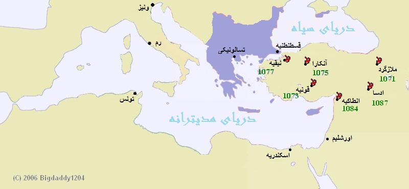 برگردان نقشه انگلیسی پس از نبرد ملازگرد